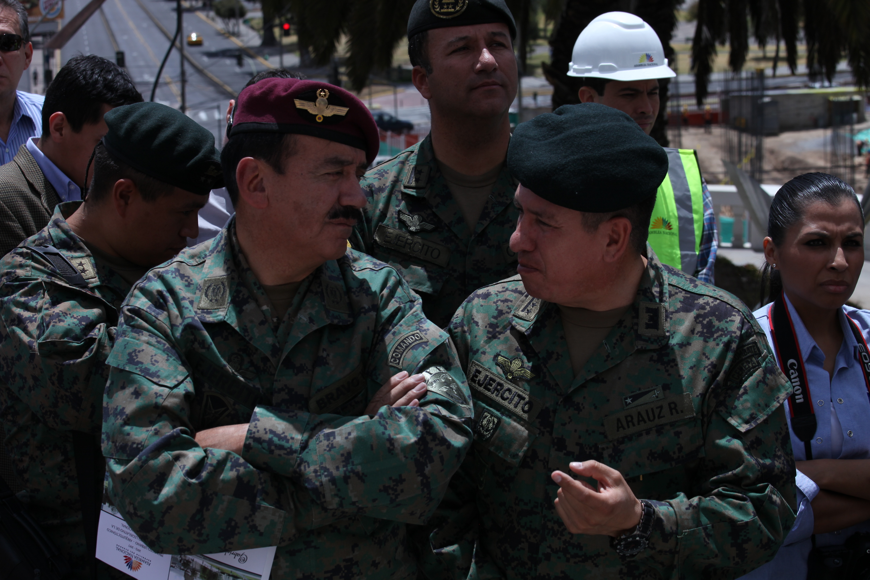 Foto : Marcelo Suárez / Asamblea Nacional